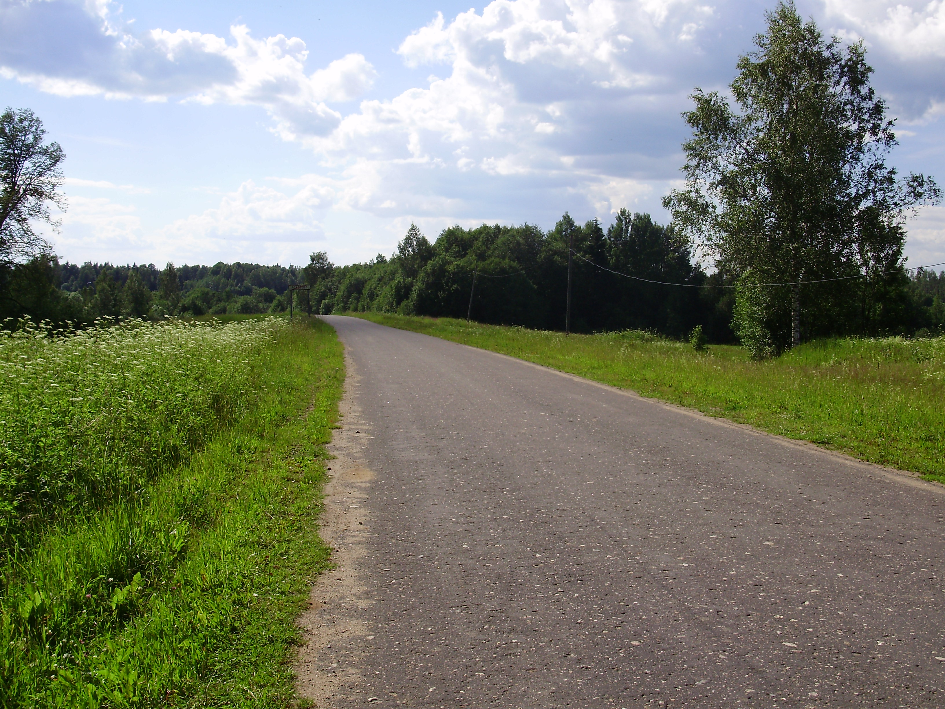 Рокотово